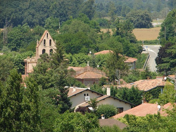 village de mauzac